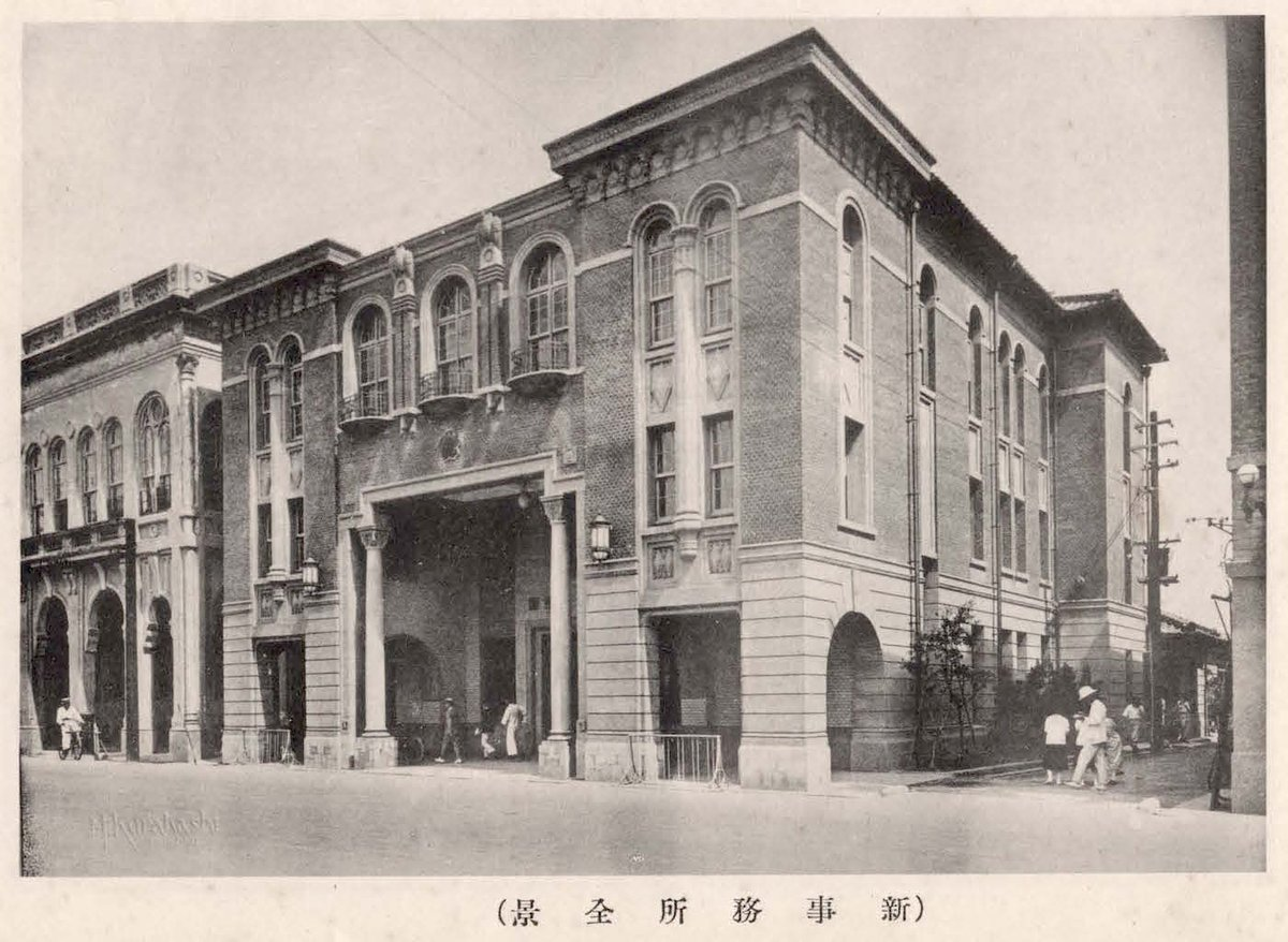 有限責任臺北信用組合新事務所全景。